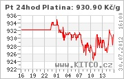 Graf Světová cena Platina v korunách Online kurz 30.7.2012 z